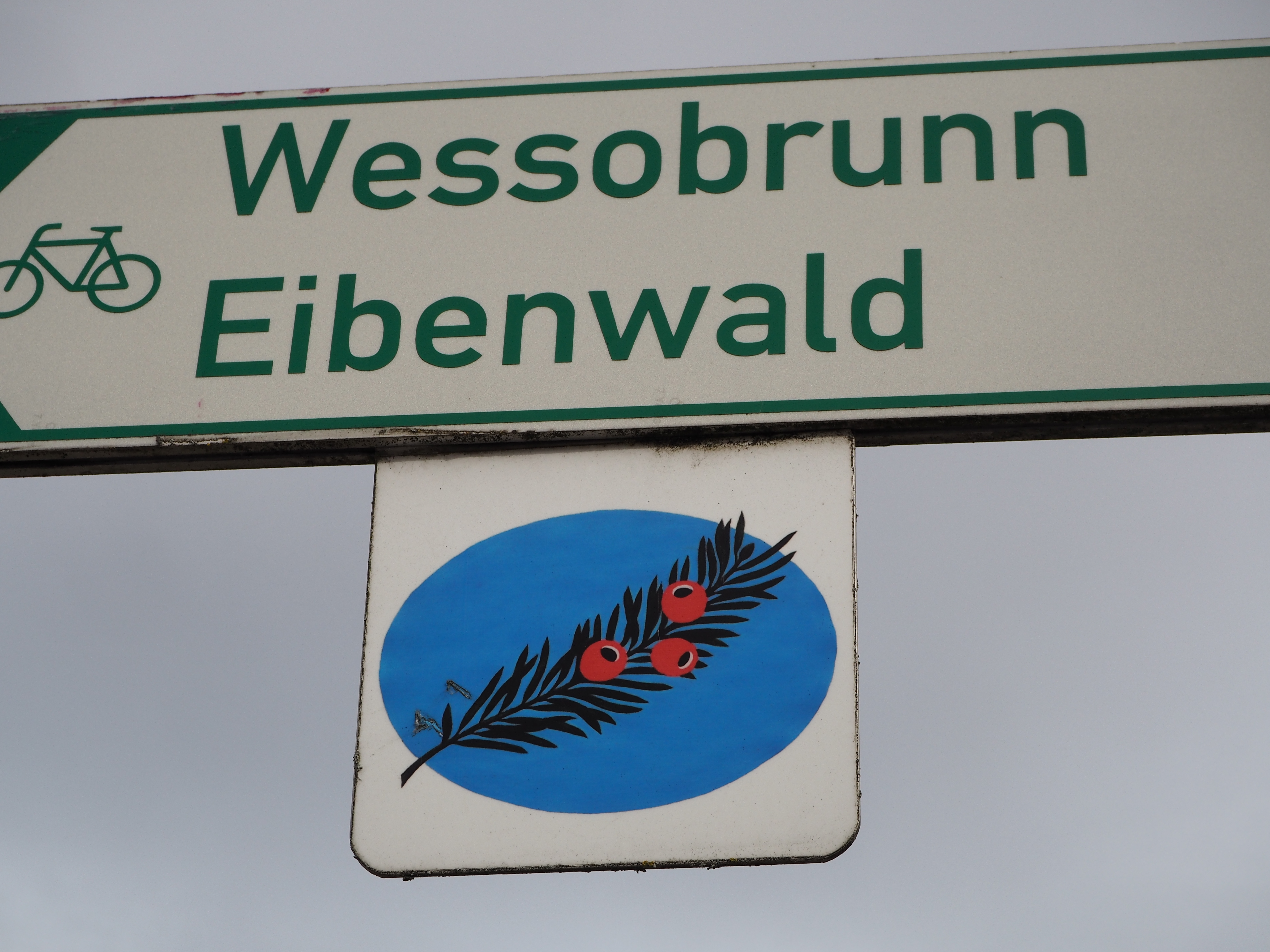 Beschilderung des Eibenlehrpfad im Paterzeller Eibenwald